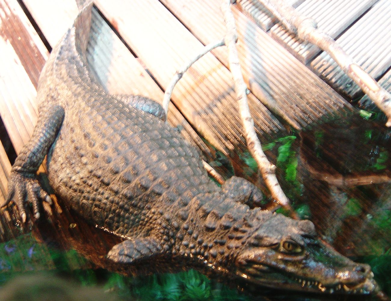 Caïman à lunettes (Caiman crocodilus)